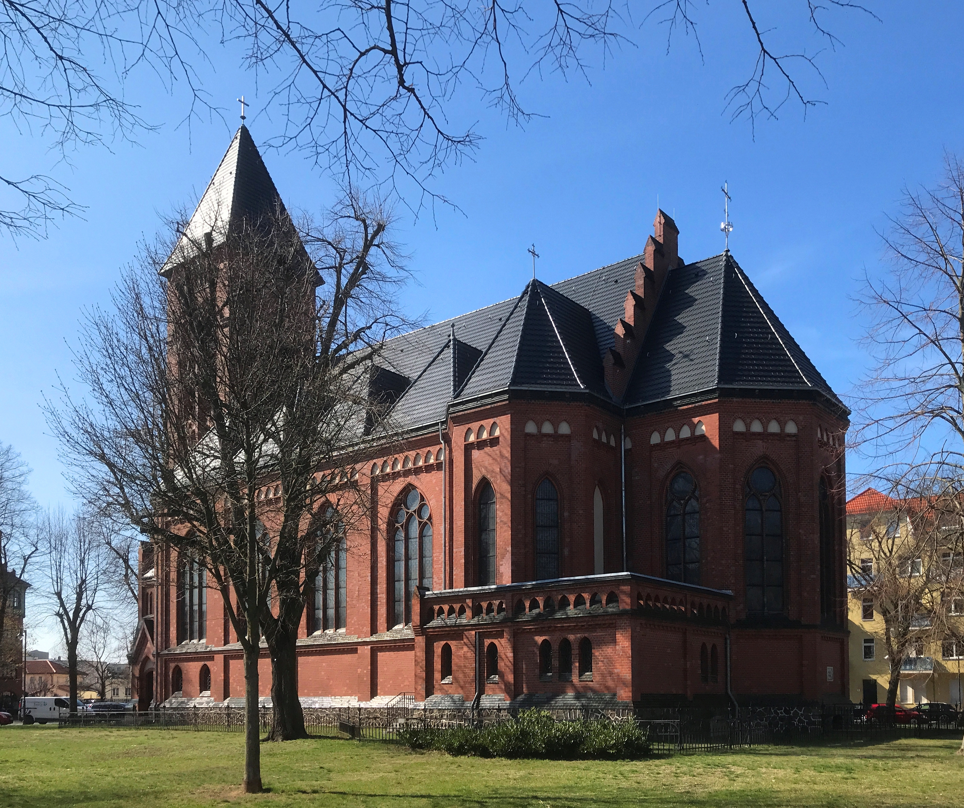 Fürstenwalde, kath. Kirche St. Johannes Baptist